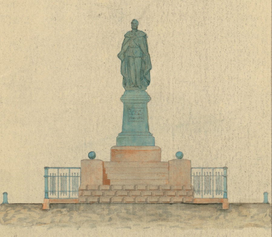 Проект памятника Императору Александру II в поселке Юзовка Бахмутского уезда Екатеринославской губернии